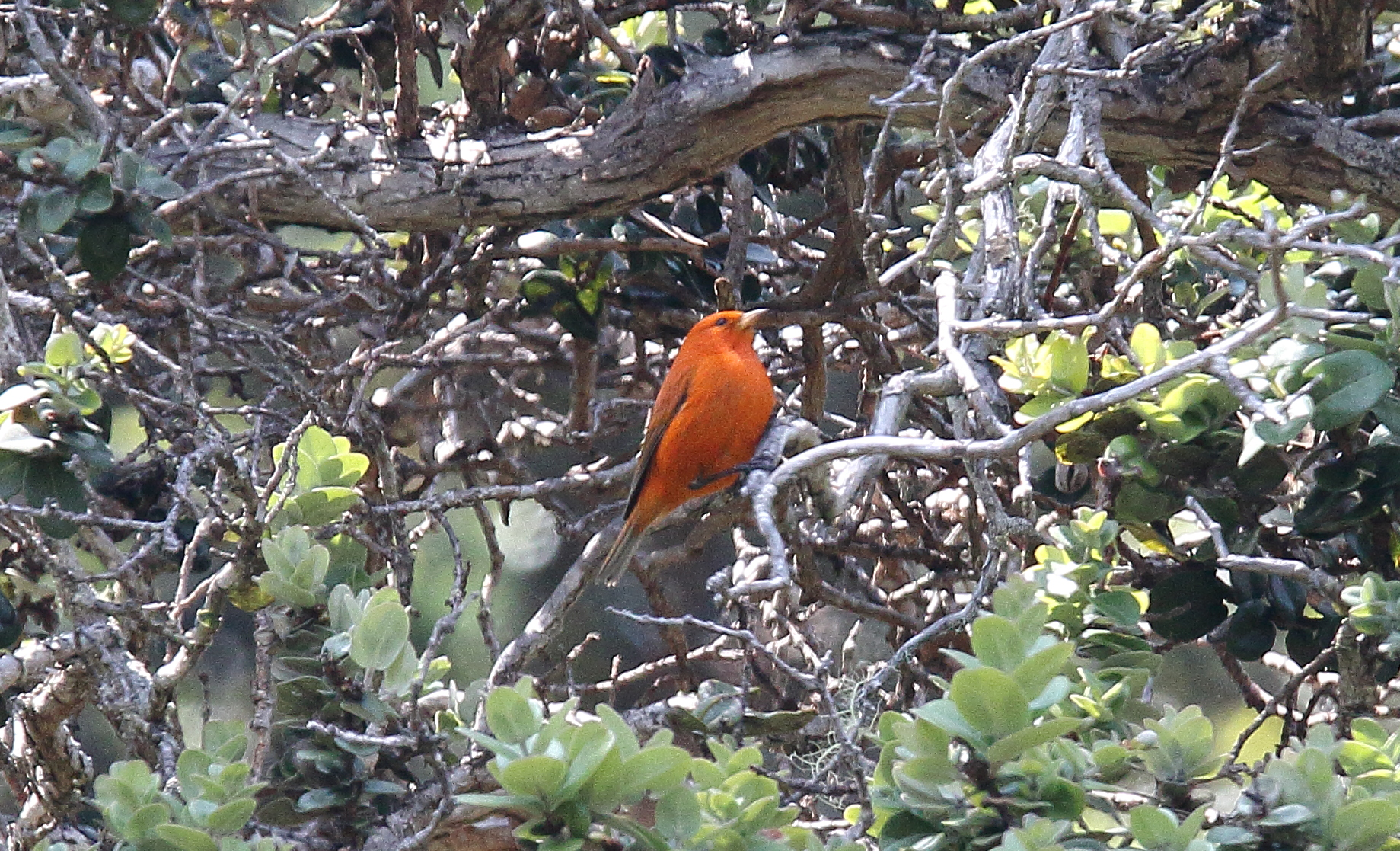 Hawaii Akepa (Loxops coccineus)